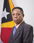 Félix da Costa, Abgeordneter des Nationalparlaments Osttimors